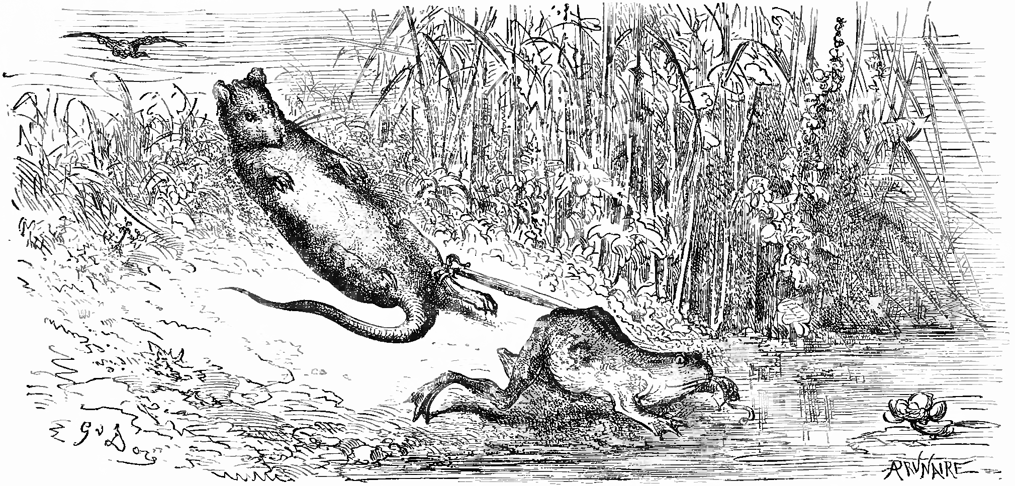 grafika z książki PL Bajki, Jean de La Fontaine, nakładem i drukiem Jana Noskowskiego, Warszawa 1876